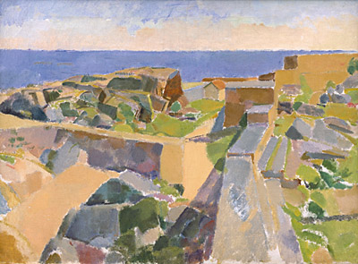 Bastioner, Christiansølabel QS:Lsv,"Bastioner, Christiansø"